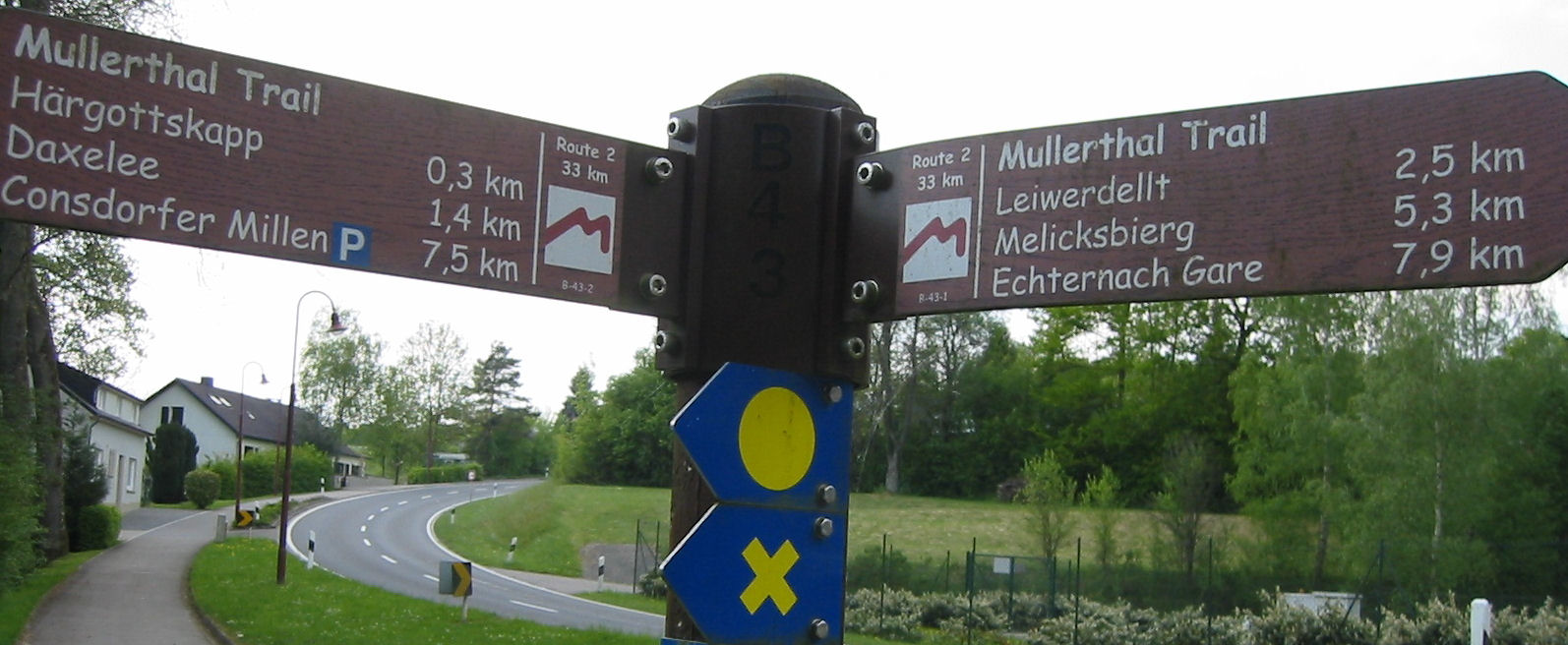 Weeweiser: Mullerthal Tral um Scheedgen (ënnen am Menu eraussichen)